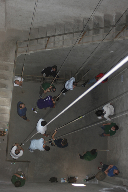 Esecuzione di un concerto solenne manuale a Borsano di Busto Arsizio (VA)